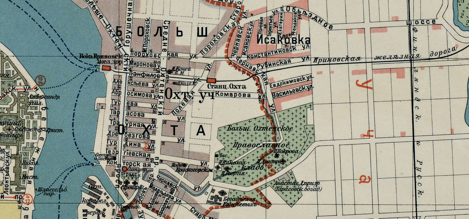 Карта Большой Охты 1914 год